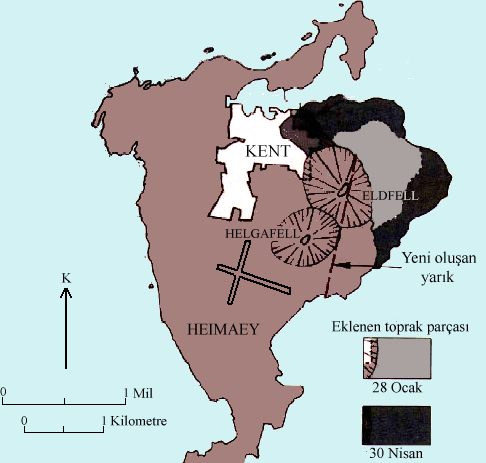 Heimaey adasının 1973 yanardağ püskürtmesi sonucunda değişimini gösteren diagram (Image:Eldfell eruption diagram.png kaynaklı diagramın Türkçeleştirilmiş hali)